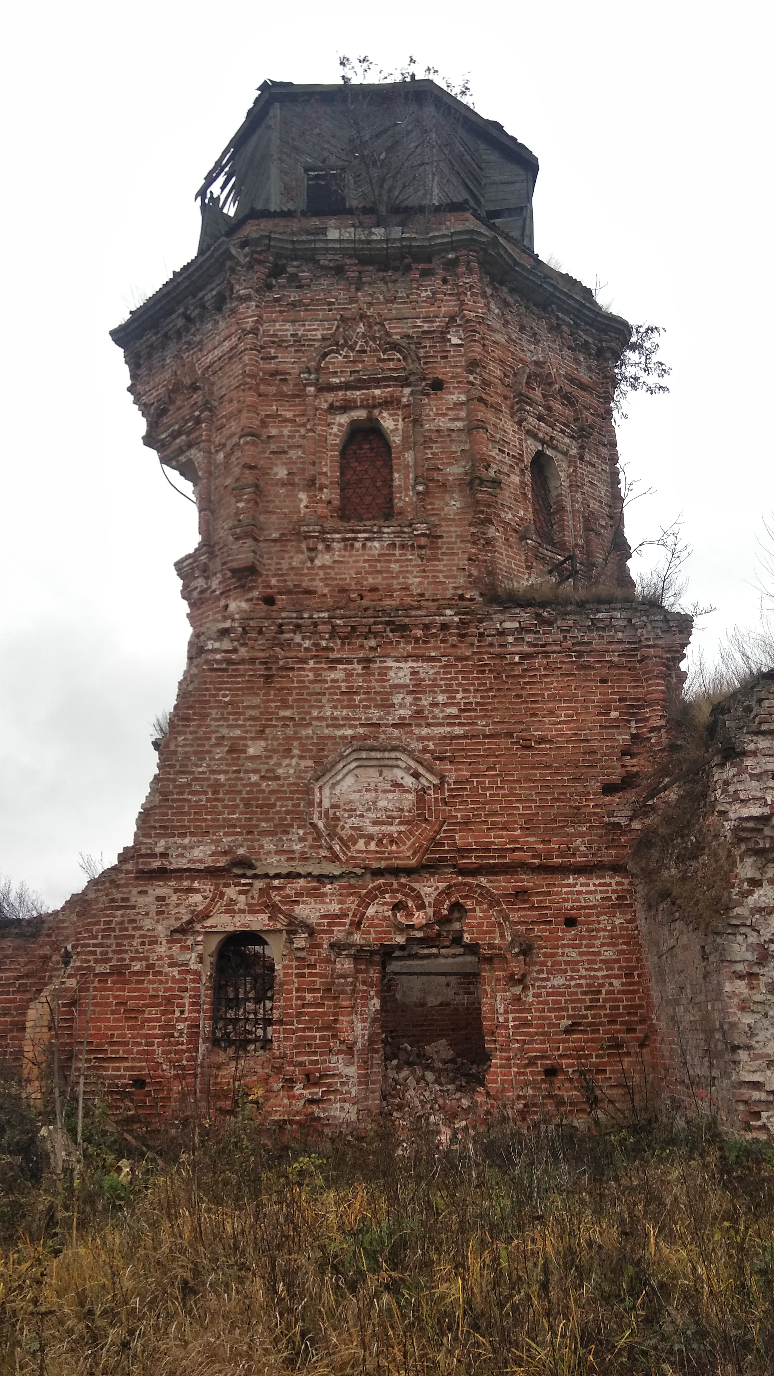 Колокольня Богоявленской церкви в Костино, 2018.